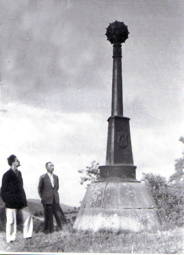 Monumentul "Buzdugan"